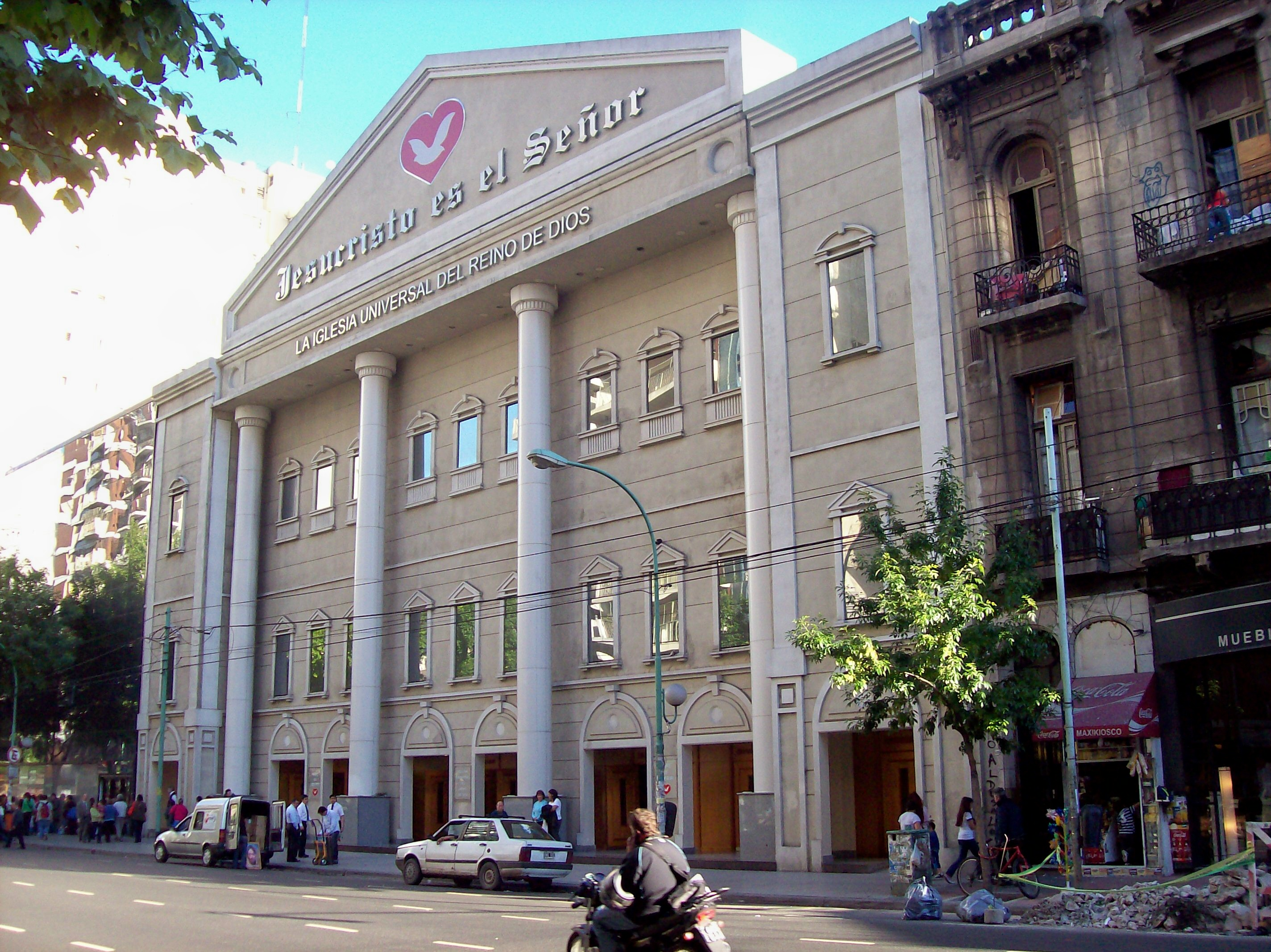 Iglesia Universal del Reino de Dios, en Avenida Corrientes 4200, (lado sur), Ciudad de Buenos Aires, Argentina.